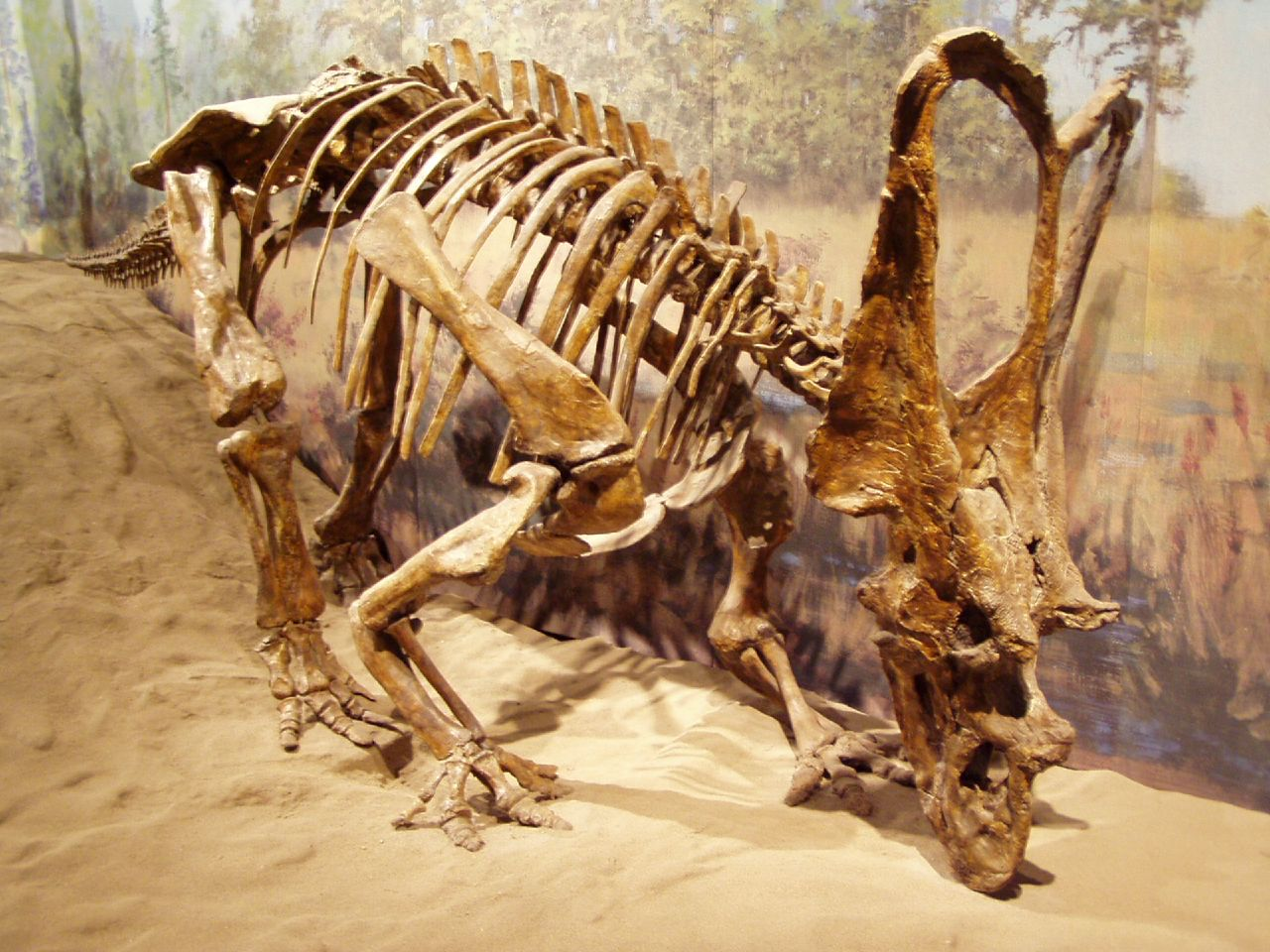 Chasmosaurus russelli